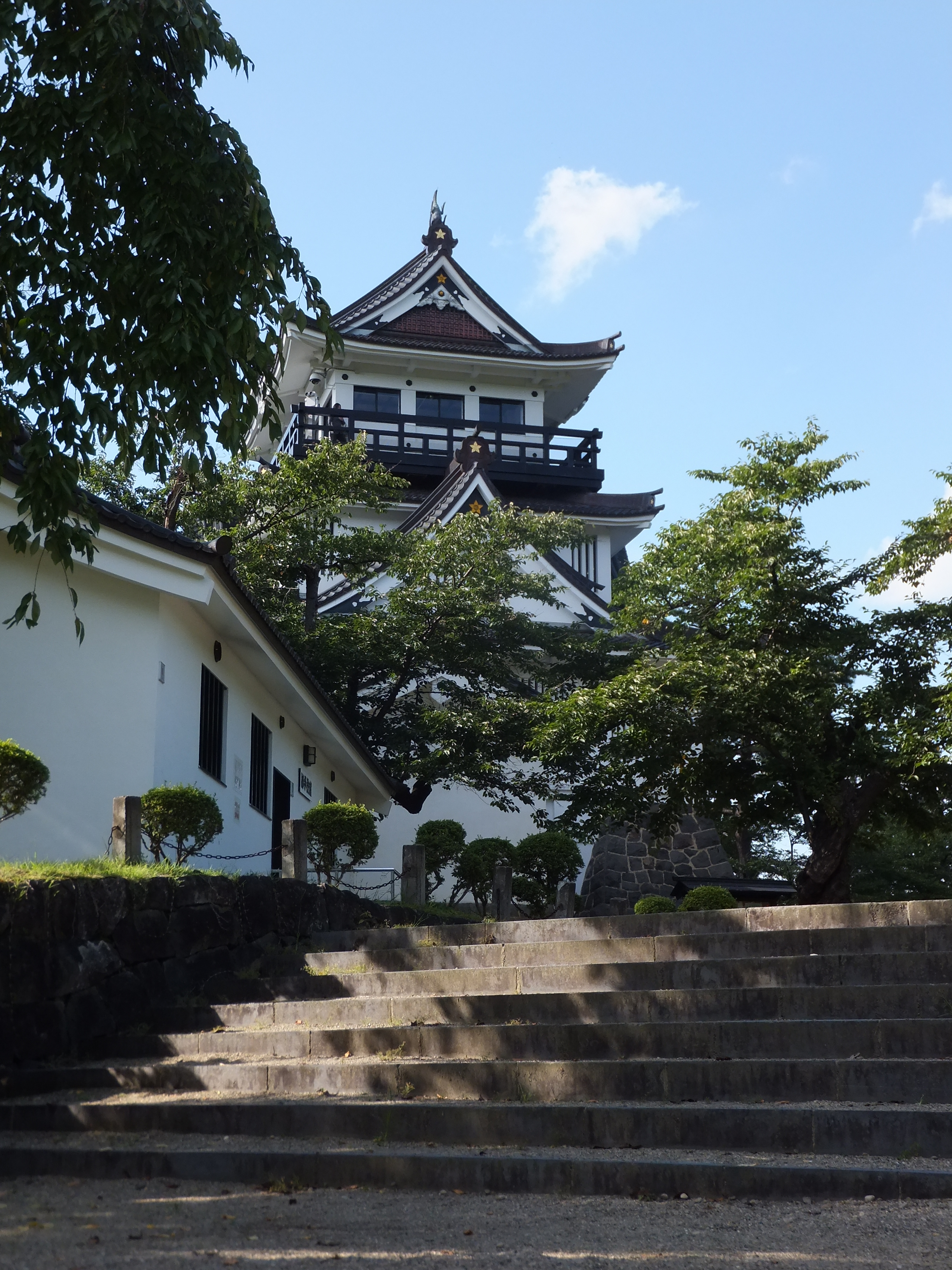 横手城模擬天守。内部は郷土資料館となっている。